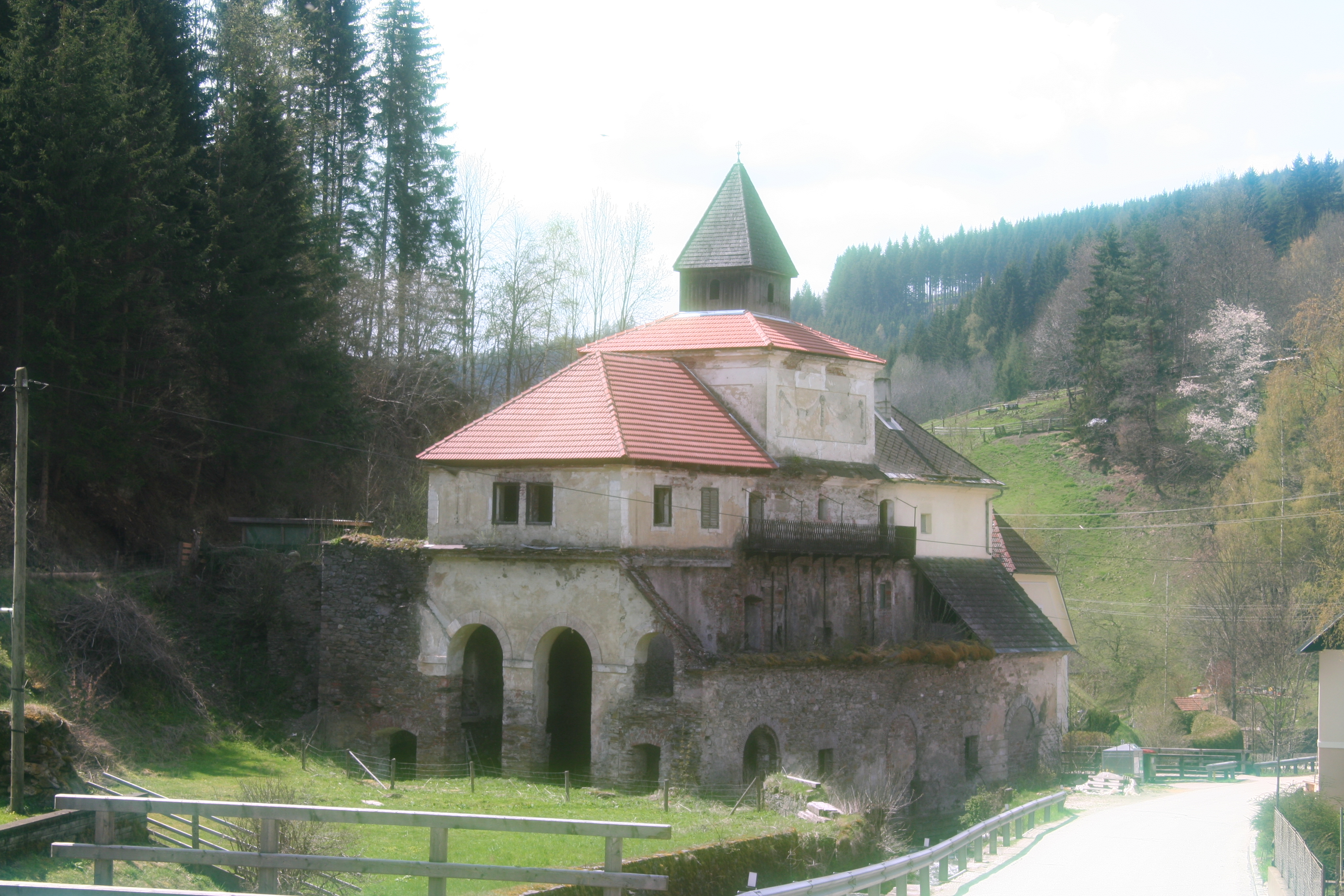 Hochofen in Mosinz, Hüttenberg, Kärnten